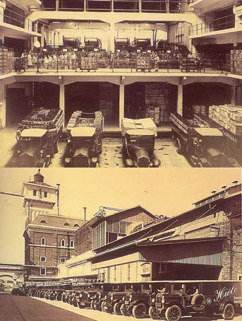 Antecedentes históricos de la industria cervecera en Uruguay